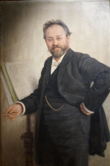 Josef Krug-Waldsee. Öl auf Leinwand, von Emil Schwabe. Museum im Kornhaus, Bad Waldsee.